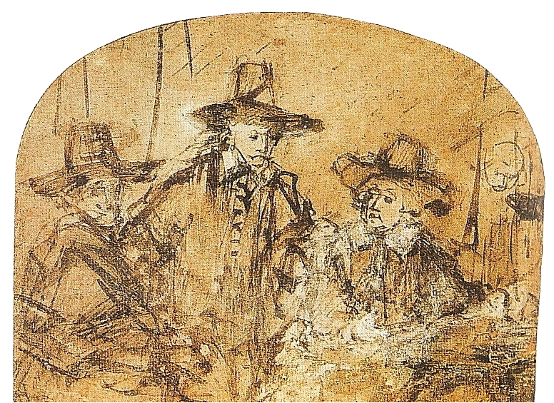 Trzej syndycy cechu sukienników. Provenance: Kupferstichkabinett, Berlin